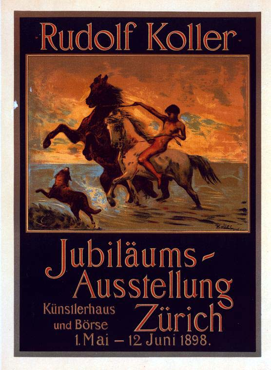 Ausstellungsplakat zur Jubiläumssausstellung 1898